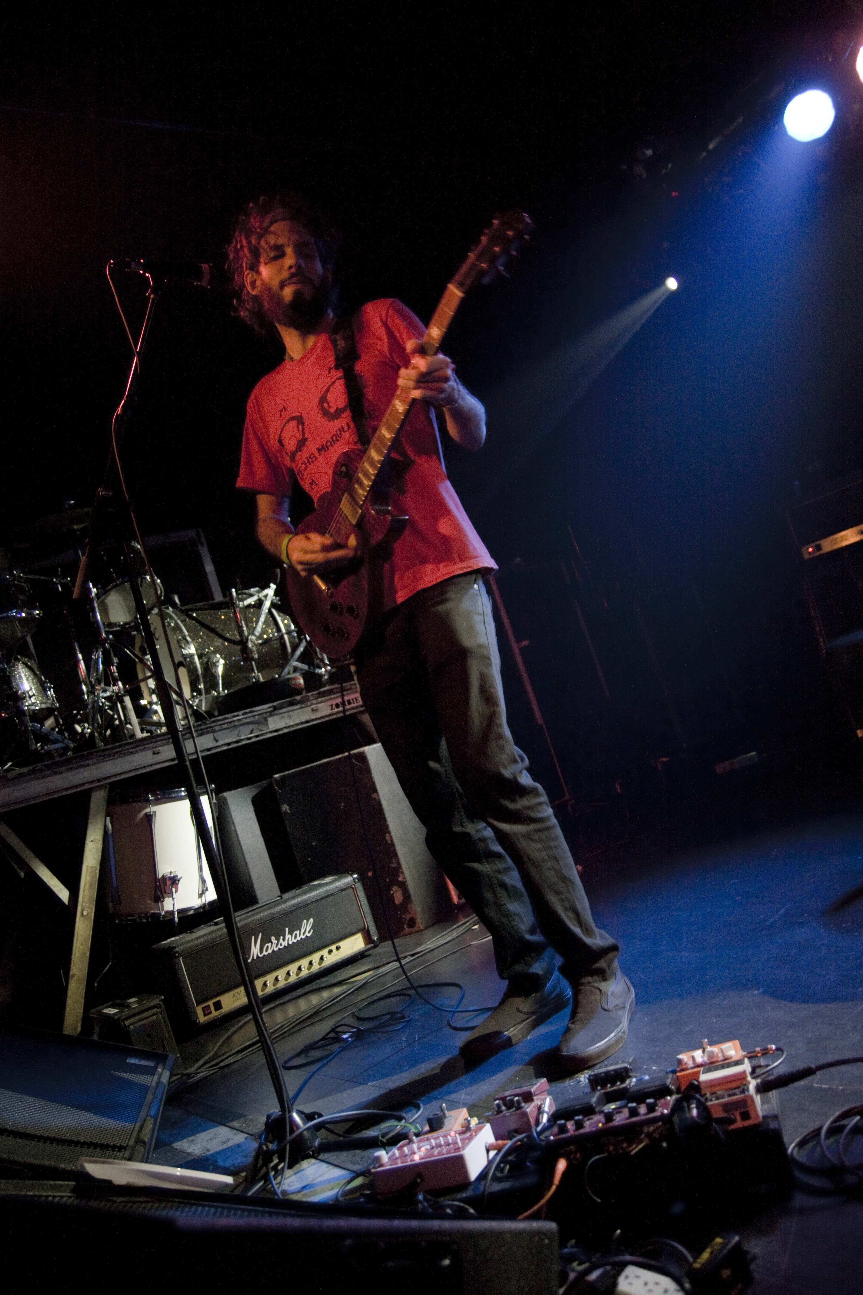 Foto: Rosario López